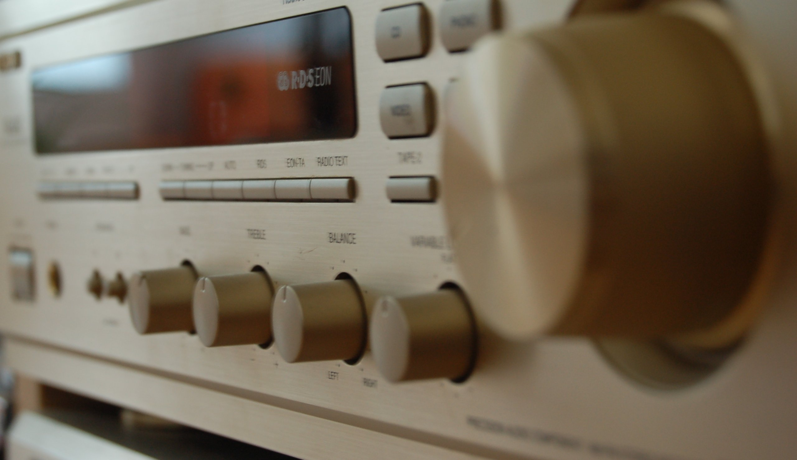 Denon DRA-1000 Verstärker